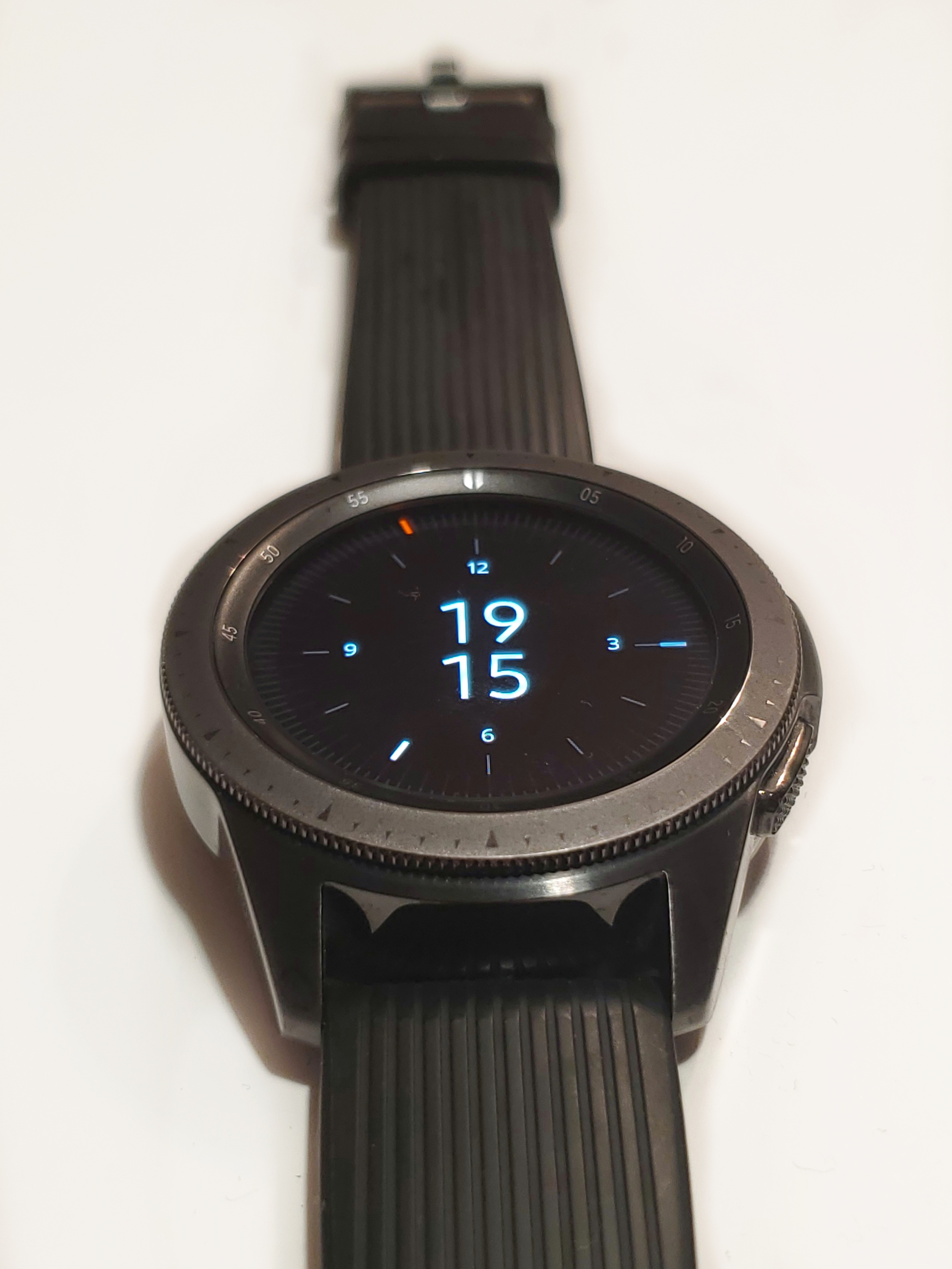 Samsung Galaxy Watch 42mm with an unofficial watchface. Samsung Galaxy Watch 42mm avec un cadran non officiel.